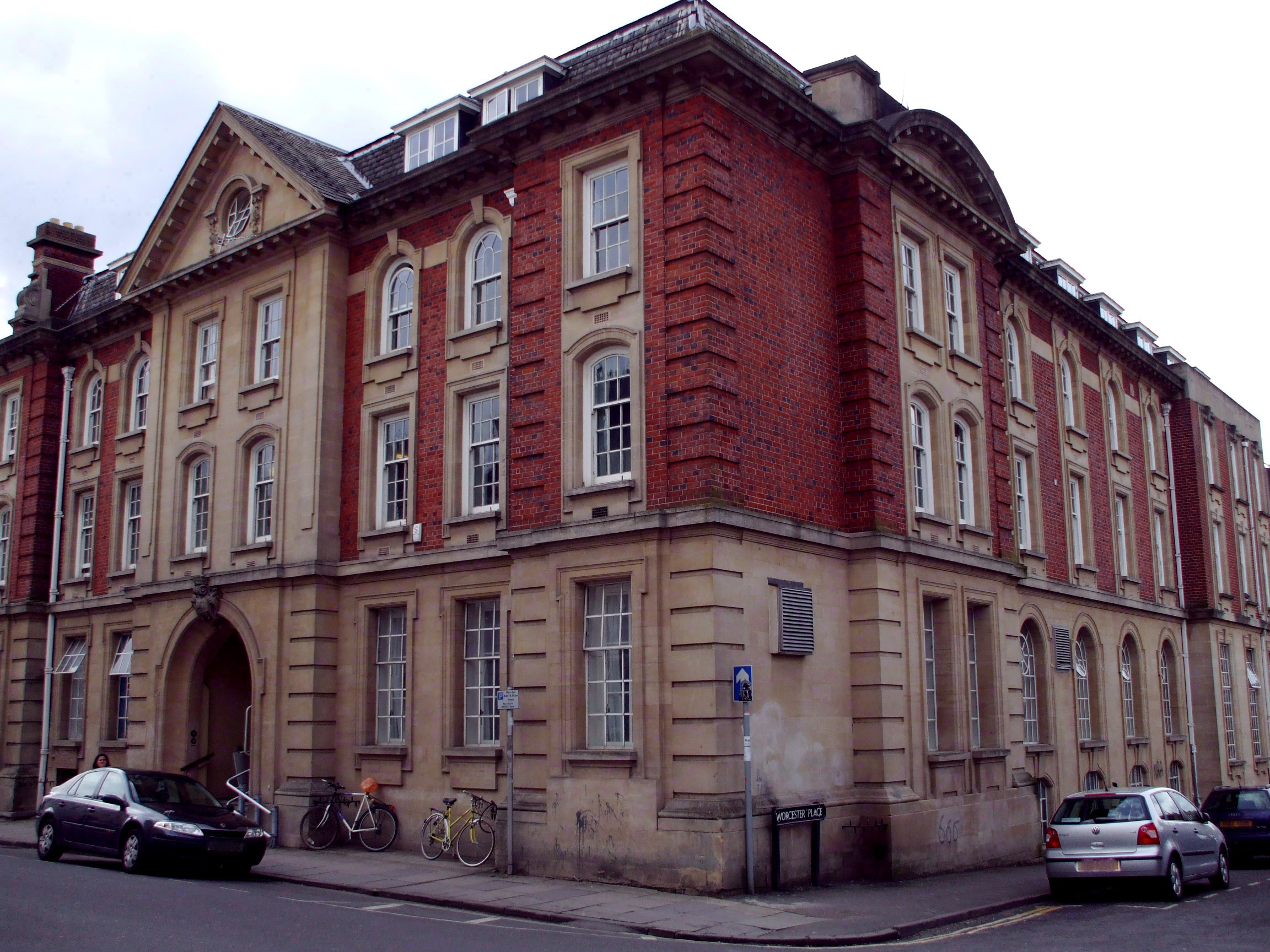 Ruskin College, Oxford, England